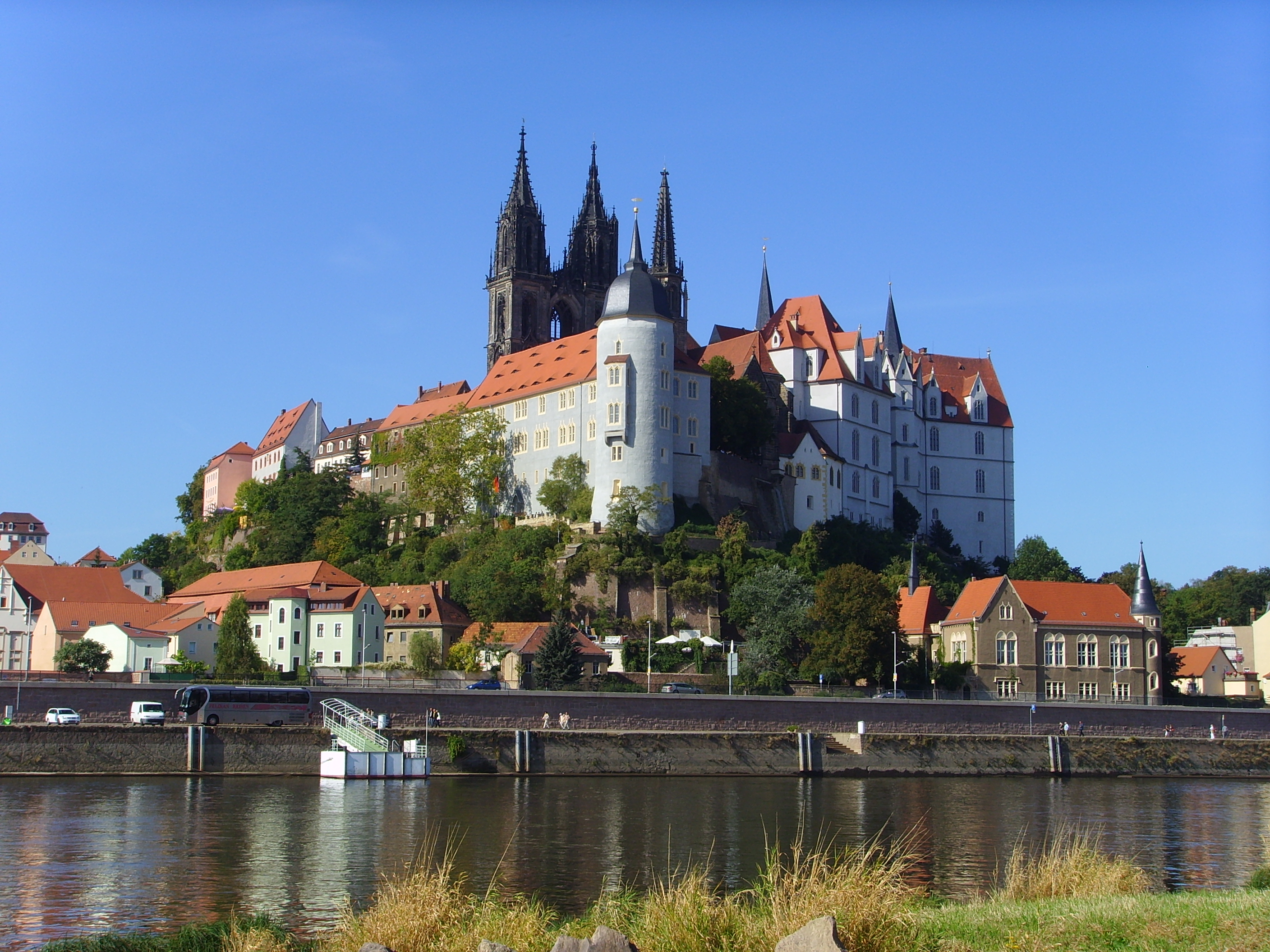 Meißen Burgberg mit Albrechtsburg und Dom